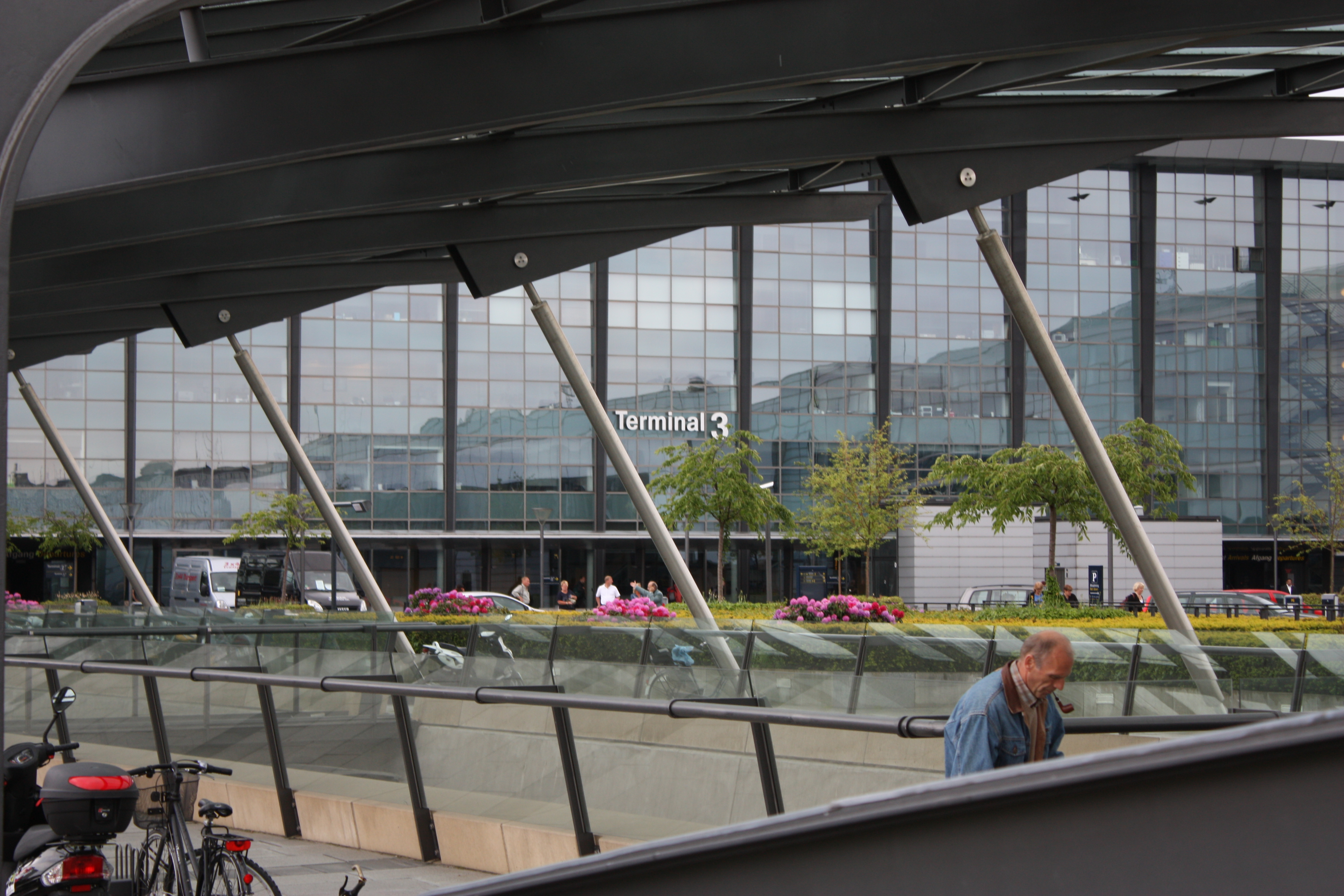 Flughafen Kopenhagen 2009